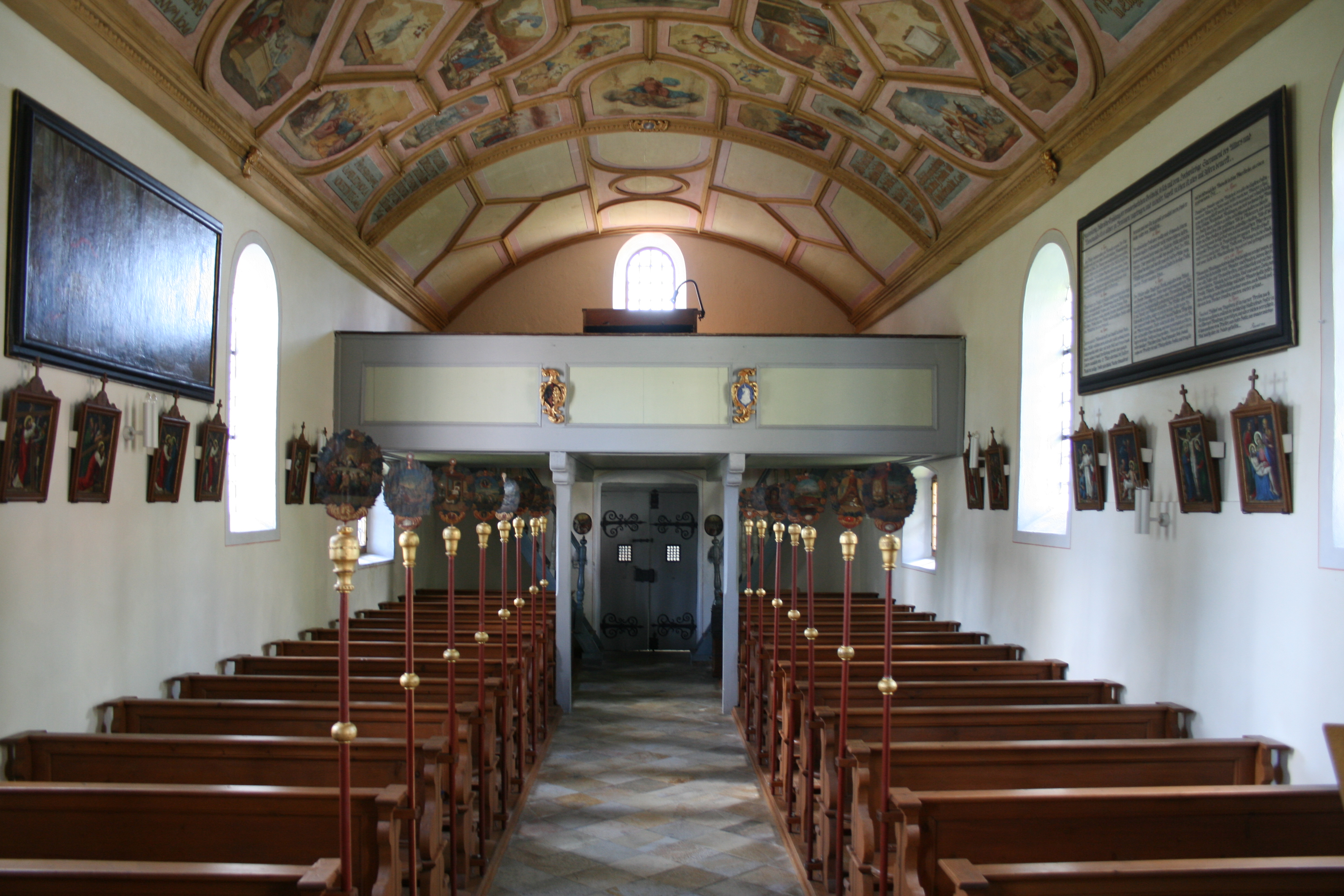 Schiff der Riedkapelle in Benningen